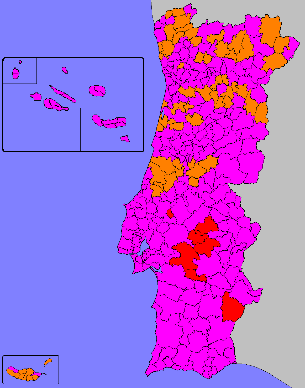 Partido mais votado por Concelho nas Europeias de 2019 em Portugal (Mapa)